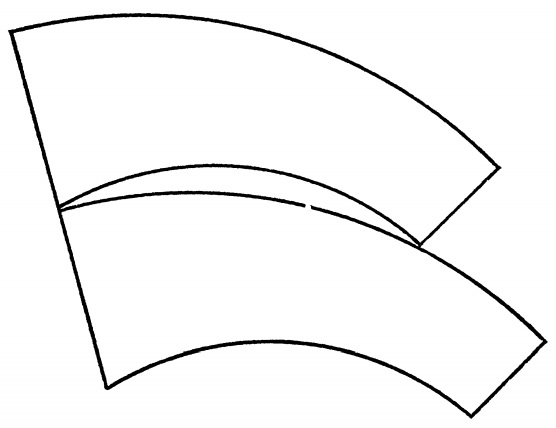 Dois segmentos de arco que afunilam para uma extremidade, de forma e tamanho idênticos, dispostos um acima do outro e de modo a que os limites esquerdos de cada um estejam alinhados, provocando a ilusão que o segmento inferior é maior.